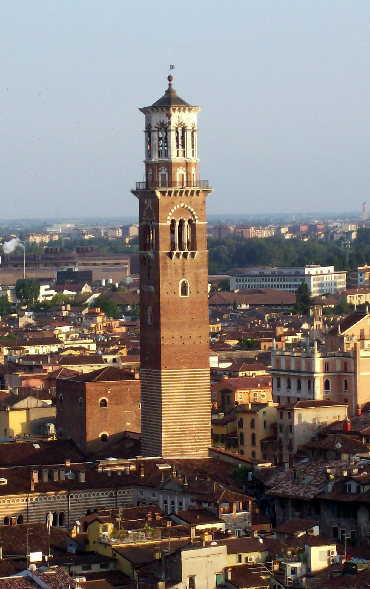 La Torre dei Lamberti vista dal campanile della Cattedrale di Verona.